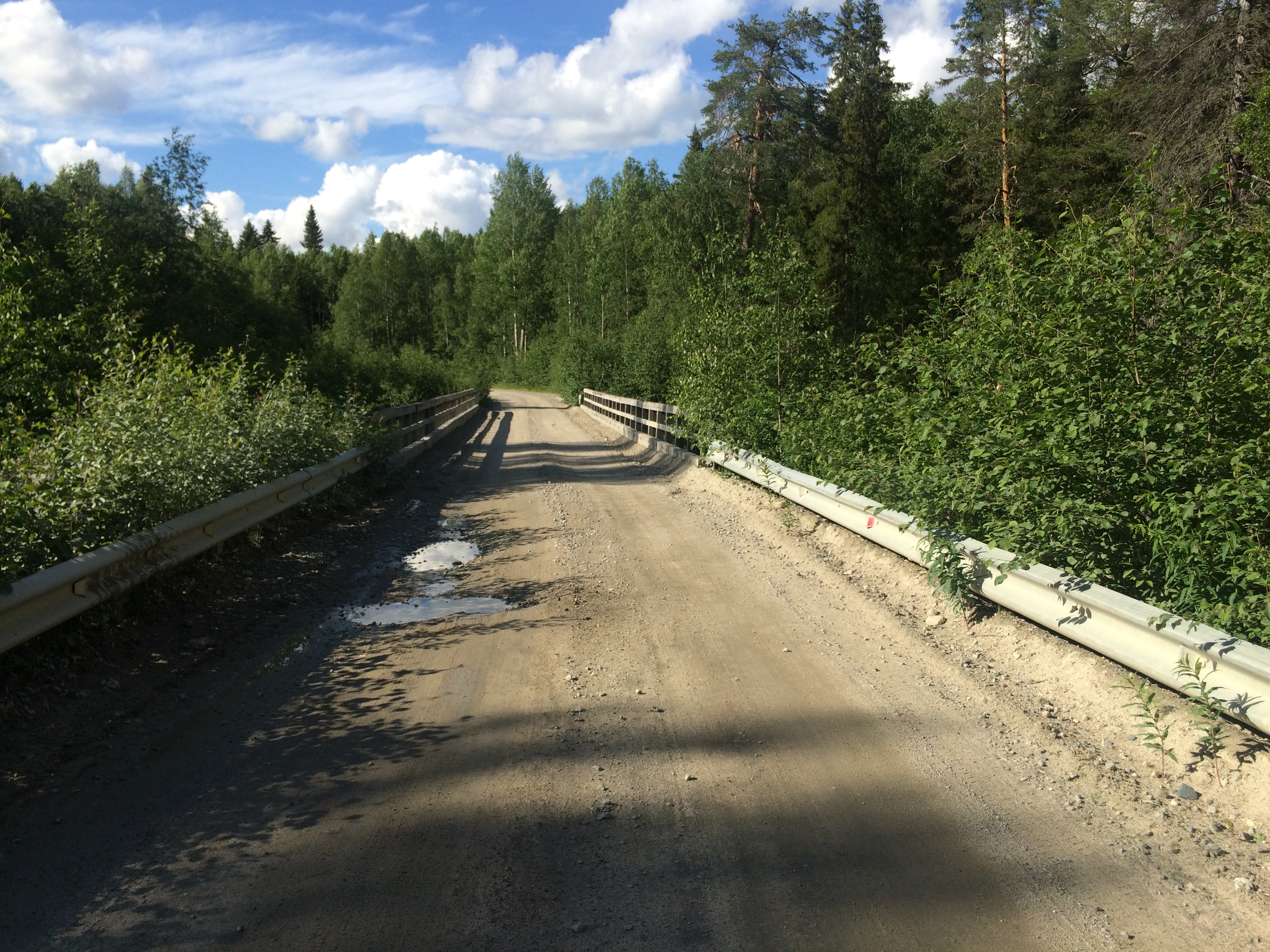 Вотто